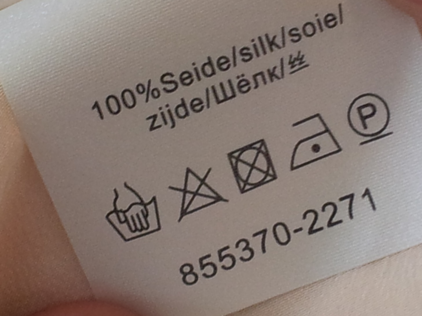 Etikett mit Textilpflegesymbolen